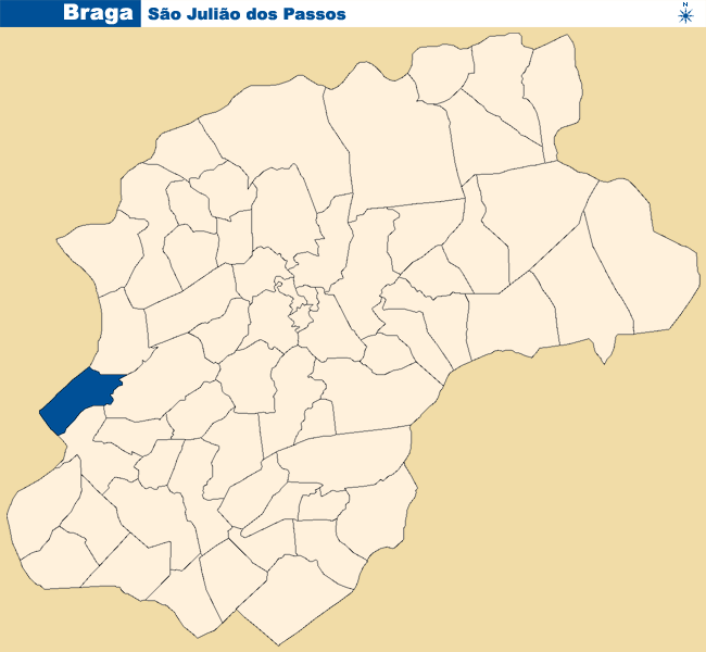 Localização de São Julião dos Passos no concelho de Braga